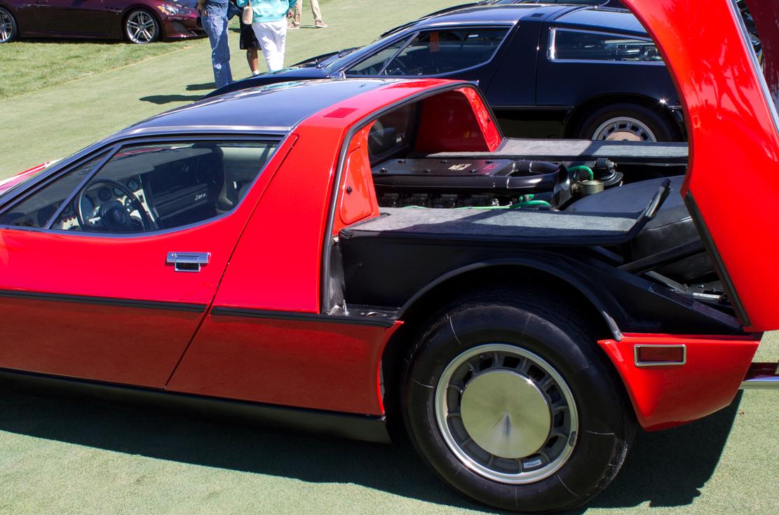 Maserati Bora. Taken at Concorso Italiano 2014.